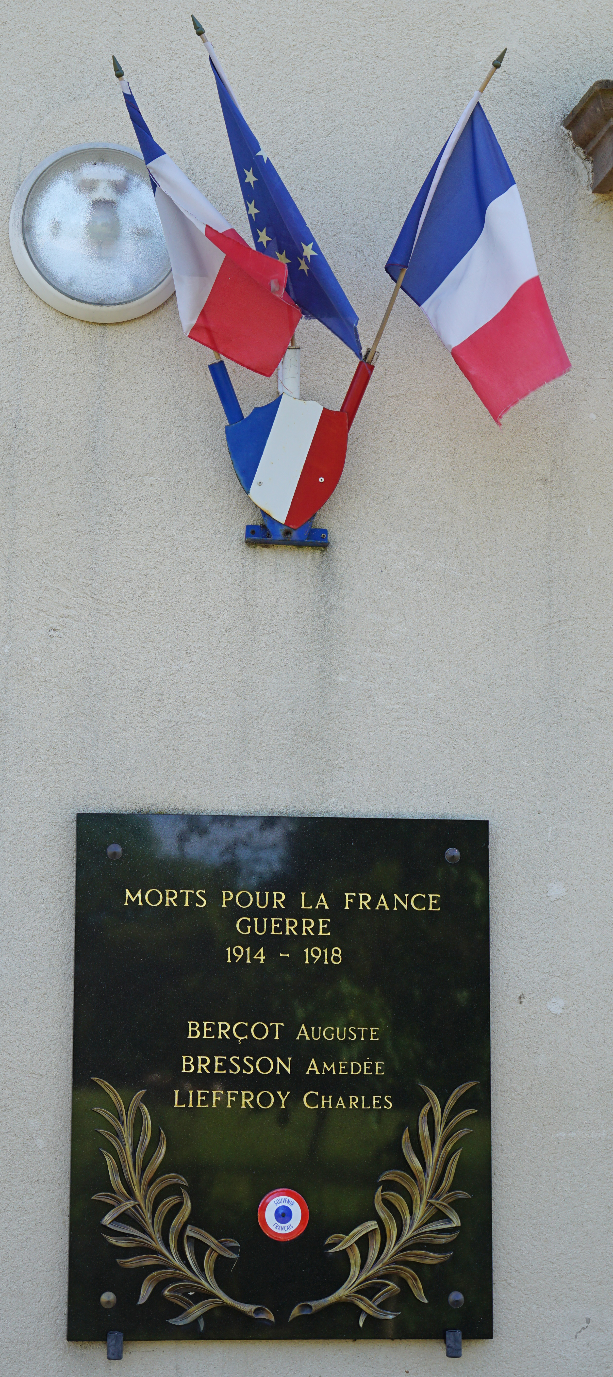 Plaque commémorative de Saint-Ferjeux.